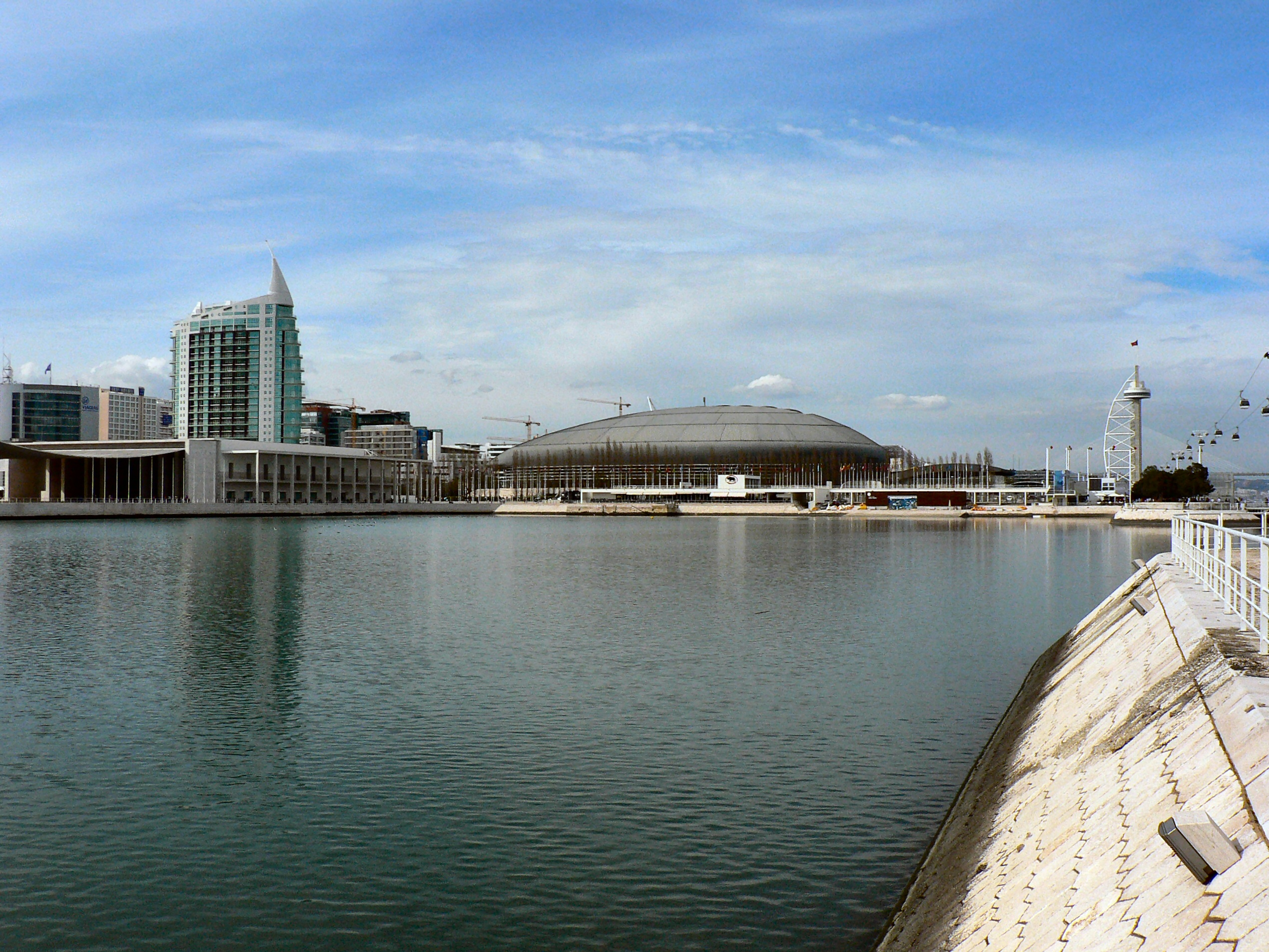 Parque das Nações em Lisboa